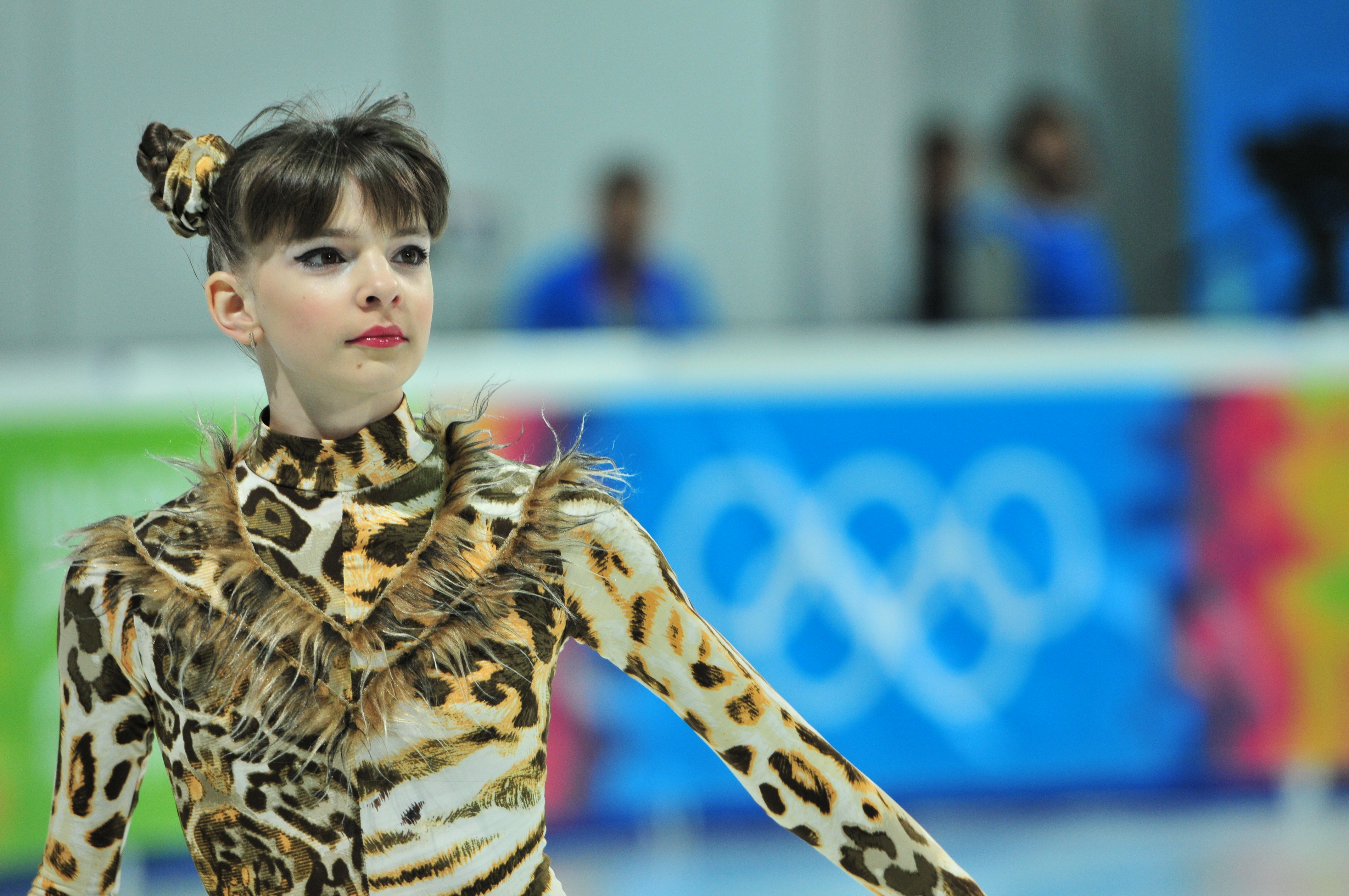 1. Jugendolympiade 2012 Innsbruck